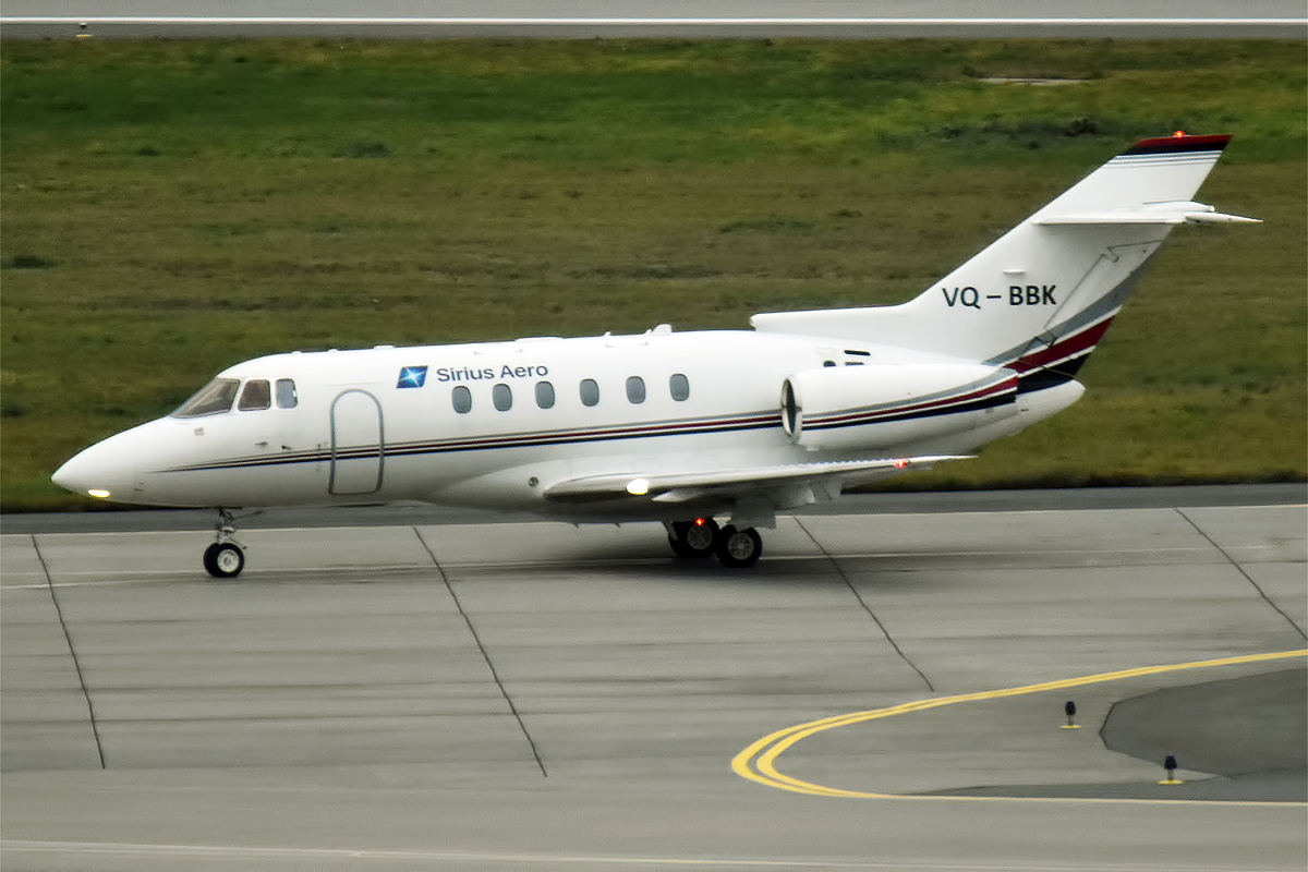 Sirius-Aero, VQ-BBK, Hawker 750